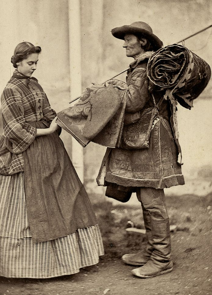 "Kotzenverkäufer" (siehe Kotze (Kleidung)). Mitte der 1860er Jahre. Albumenabzug, 16 x 12,5 cm (Bildausschnitt)